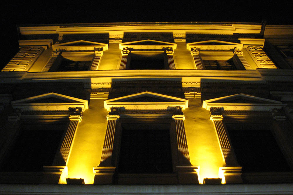 Bandinelli Palace in L'viv at night